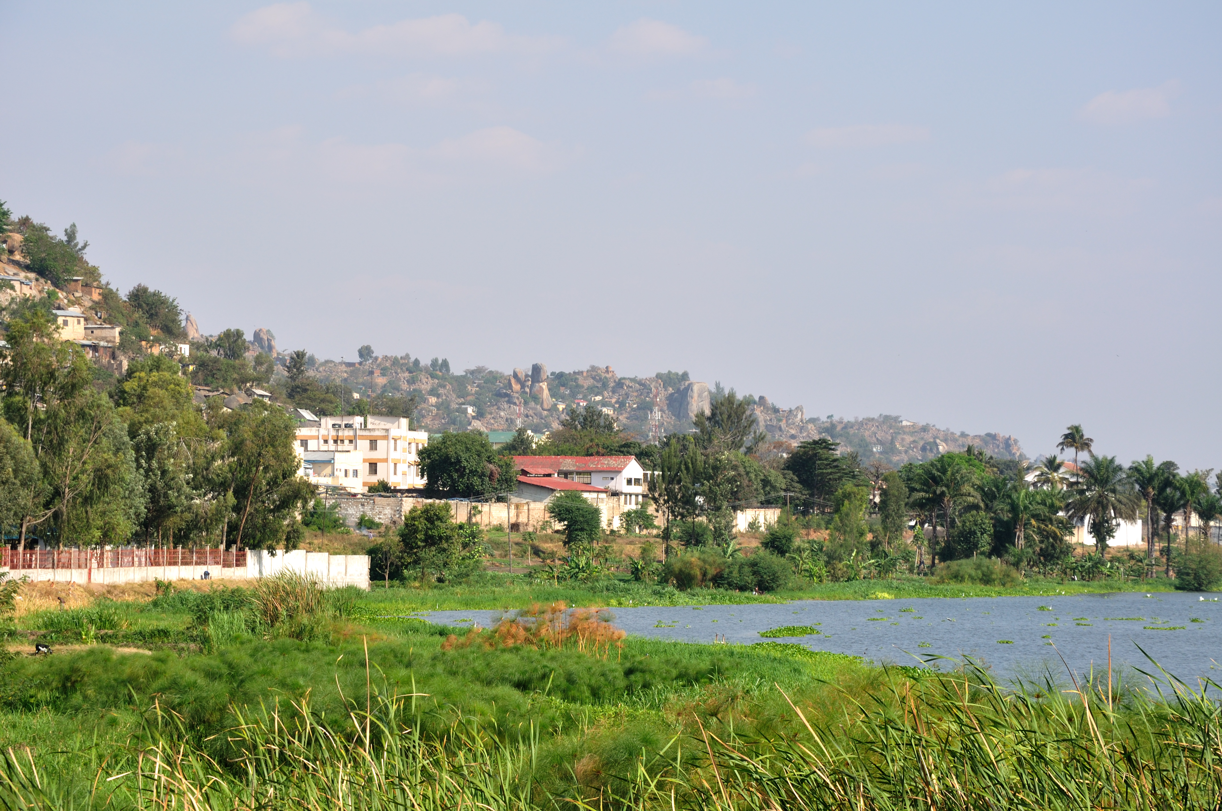 Tanzania, views in Mwanza